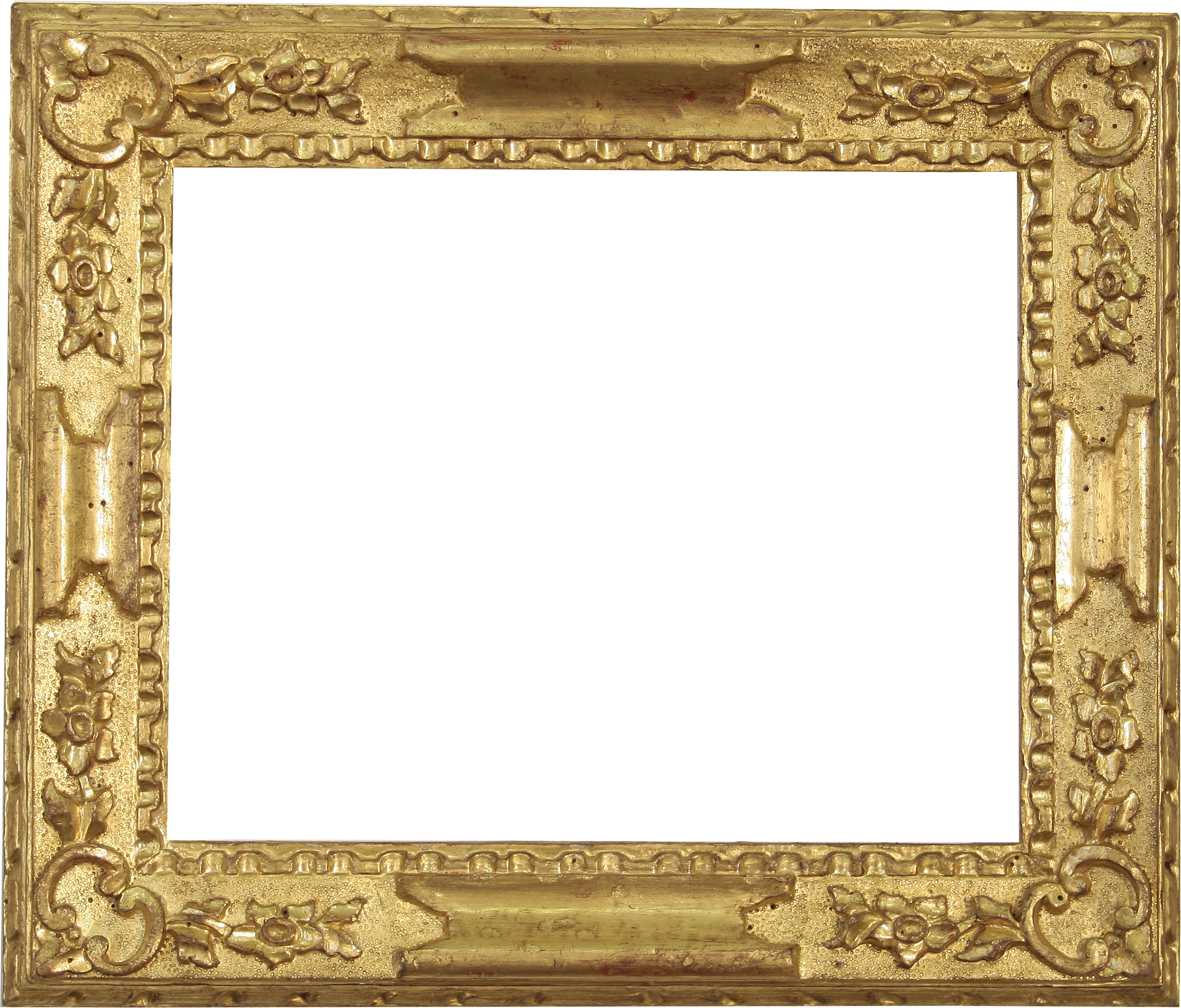 Cornice veneziana a cartelle interamente intagliata e dorata in oro zecchino.